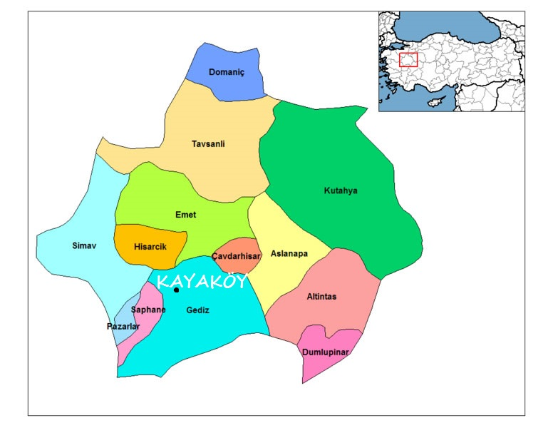 Kayaköy